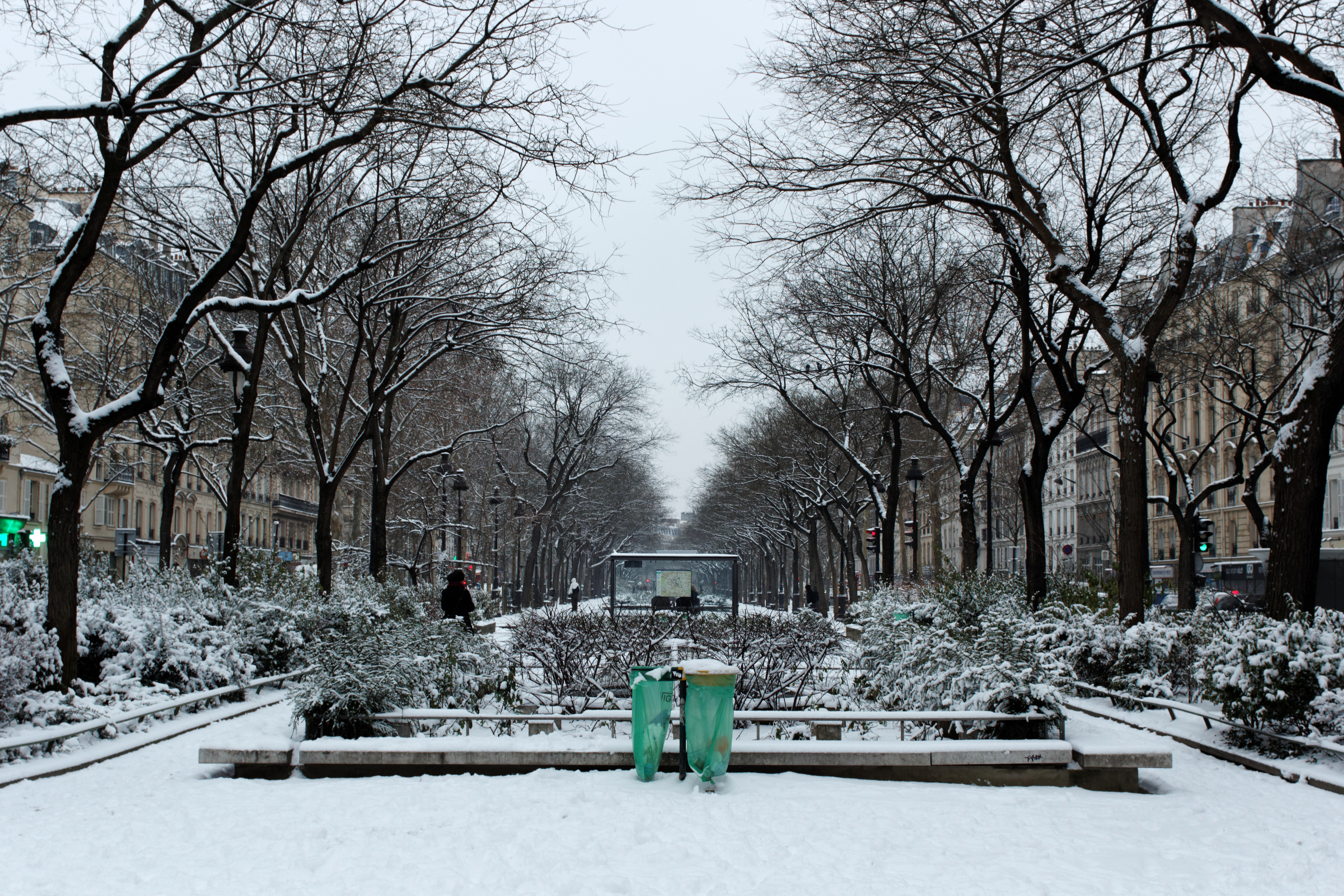 Boulevard Richard-Lenoir (Paris) depuis l'avenue de la République, sous la neige